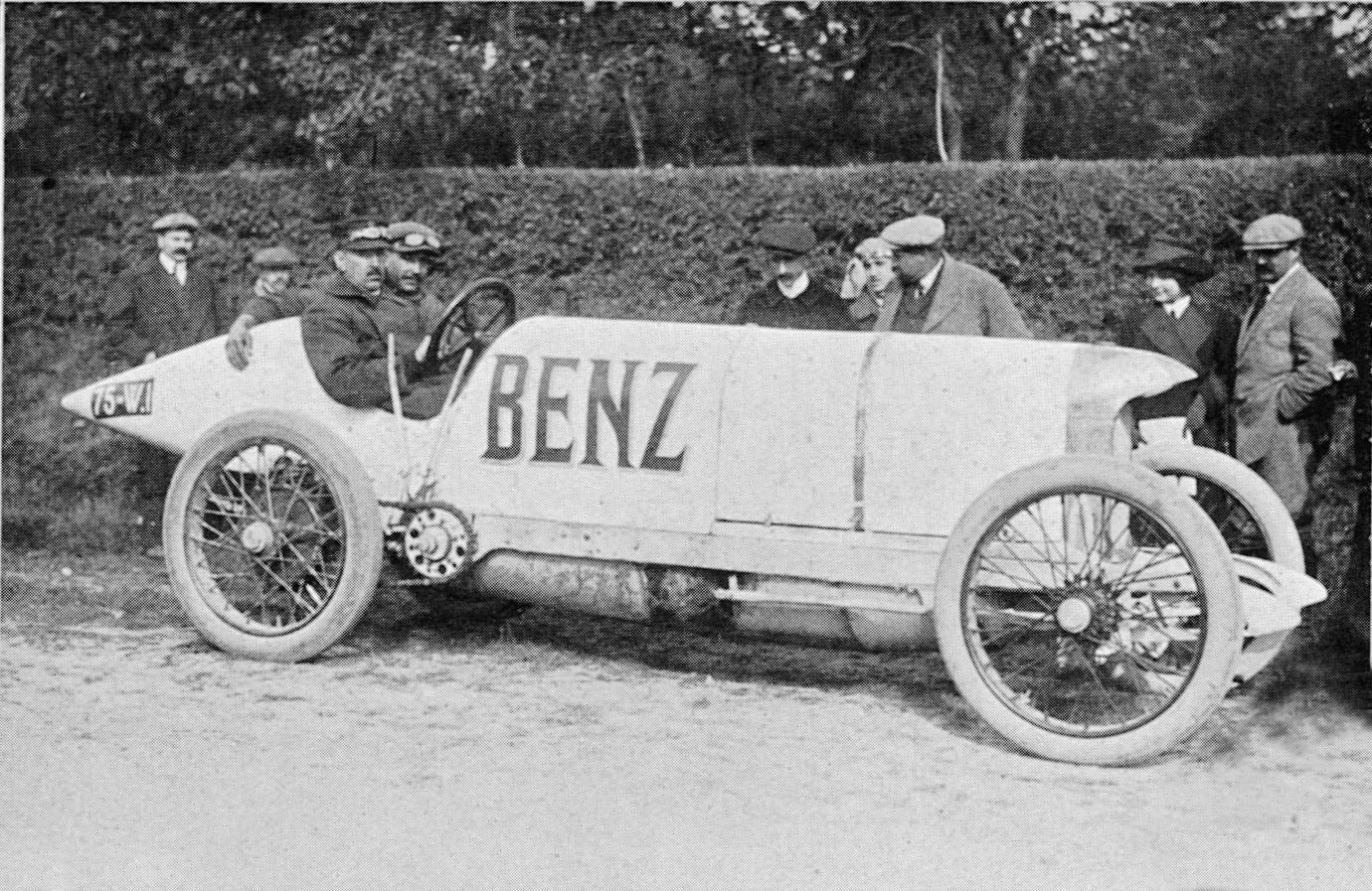 Bildbeschreibung: Blitzen-Benz Quelle: Mediaseite der DaimlerChryslerAG Genehmigung: Gern können Sie für Ihre Tätigkeit für die Wikipedia Inhalte der DaimlerChrysler Medienseiten verwenden. Dazu erkennen wir die Bedingungen nach GNU-FDL an. Das Angebot bezieht sich auch auf die vorhandenen Bilder.(Dr.Josef Ernst, Communications, DaimlerChrysler AG)